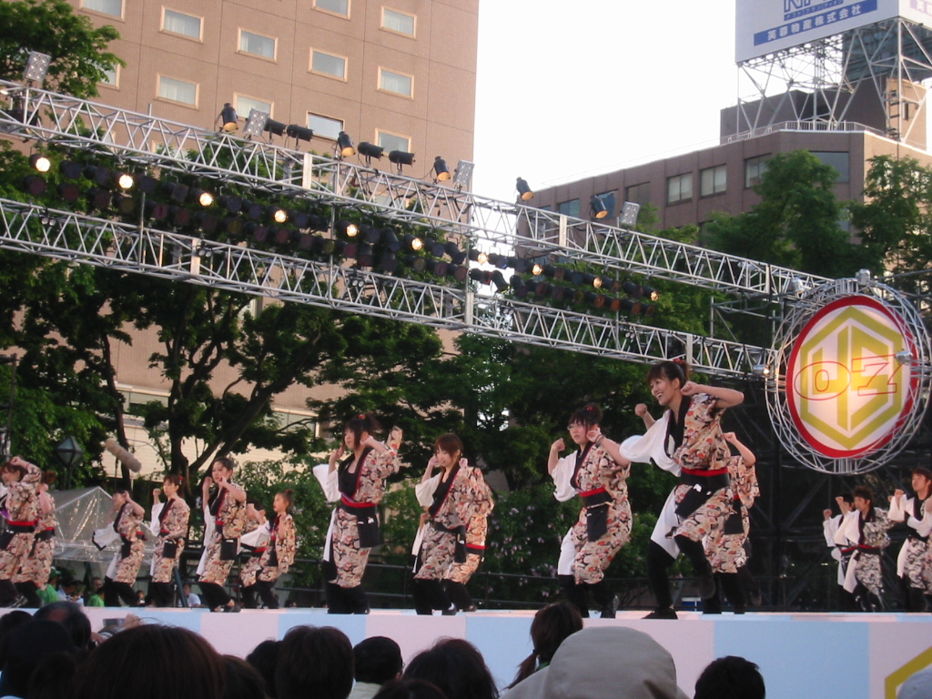 撮影場所:ja:大通公園 撮影日:2007年6月9日 撮影者:モンモン 備考:違法なja:肖像権侵害には該当しないと考え、顔にぼかしなどの画像処理は施しませんでした。なぜなら、撮影目的が百科事典の掲載のためという正当なものであり、人の多い公の場で演舞しているところを撮影したものであるということ、撮影の態様も問題なかったこと、TVカメラによる撮影が現に行われており、被撮影者は撮影されることを許諾していると推定されること、さらに、当時ja:YOSAKOIソーラン祭りの記事には写真が一枚も掲載されておらず、写真を掲載する合理的必要性があったこと、などの事情を総合的に勘案し、被撮影者の人格的利益の侵害が社会生活上受忍限度を超えるものとはいえないと考えたからです。 Licensing Category:日本の祭りの画像 Category:中央区 (札幌市)の画像